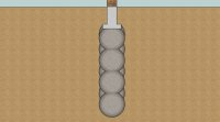 Het schematische zijaanzicht bij vertikale grondinjectie